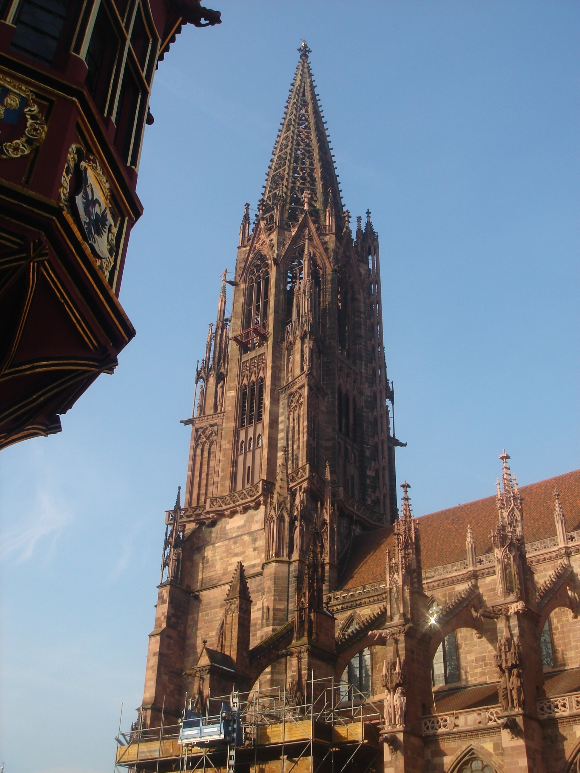 Munster at Freiburg im Breisgau